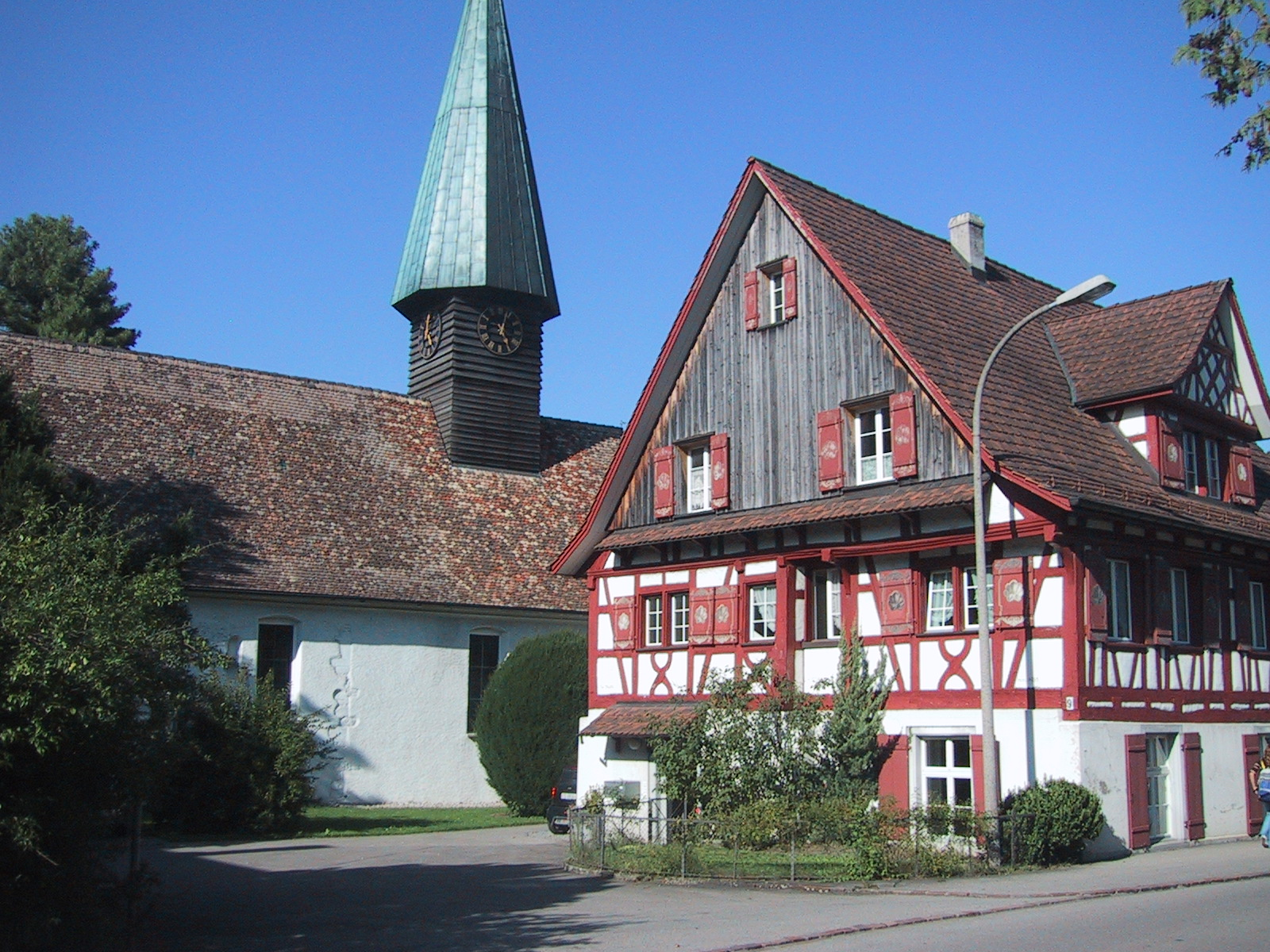 Kirche in Kurzrickenbach, Kanton Thurgau.